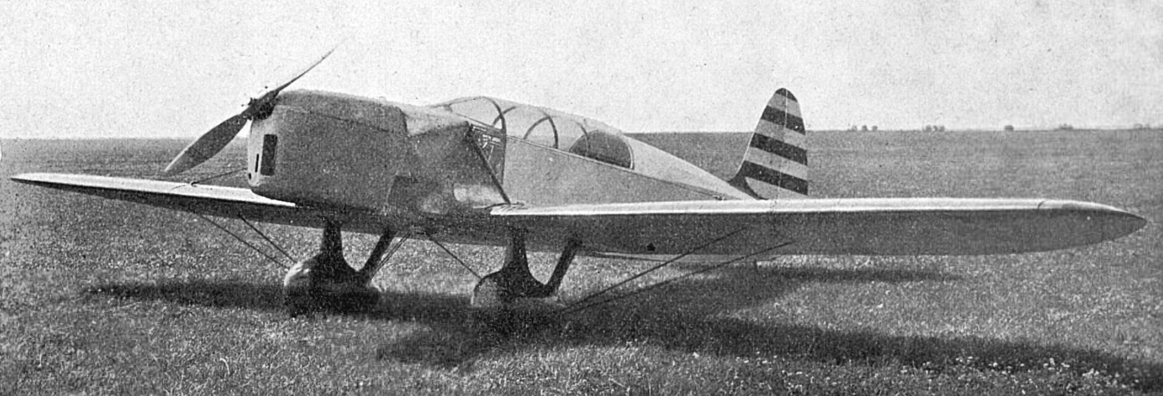 Praga BH-111 (Letectví, July 1932)